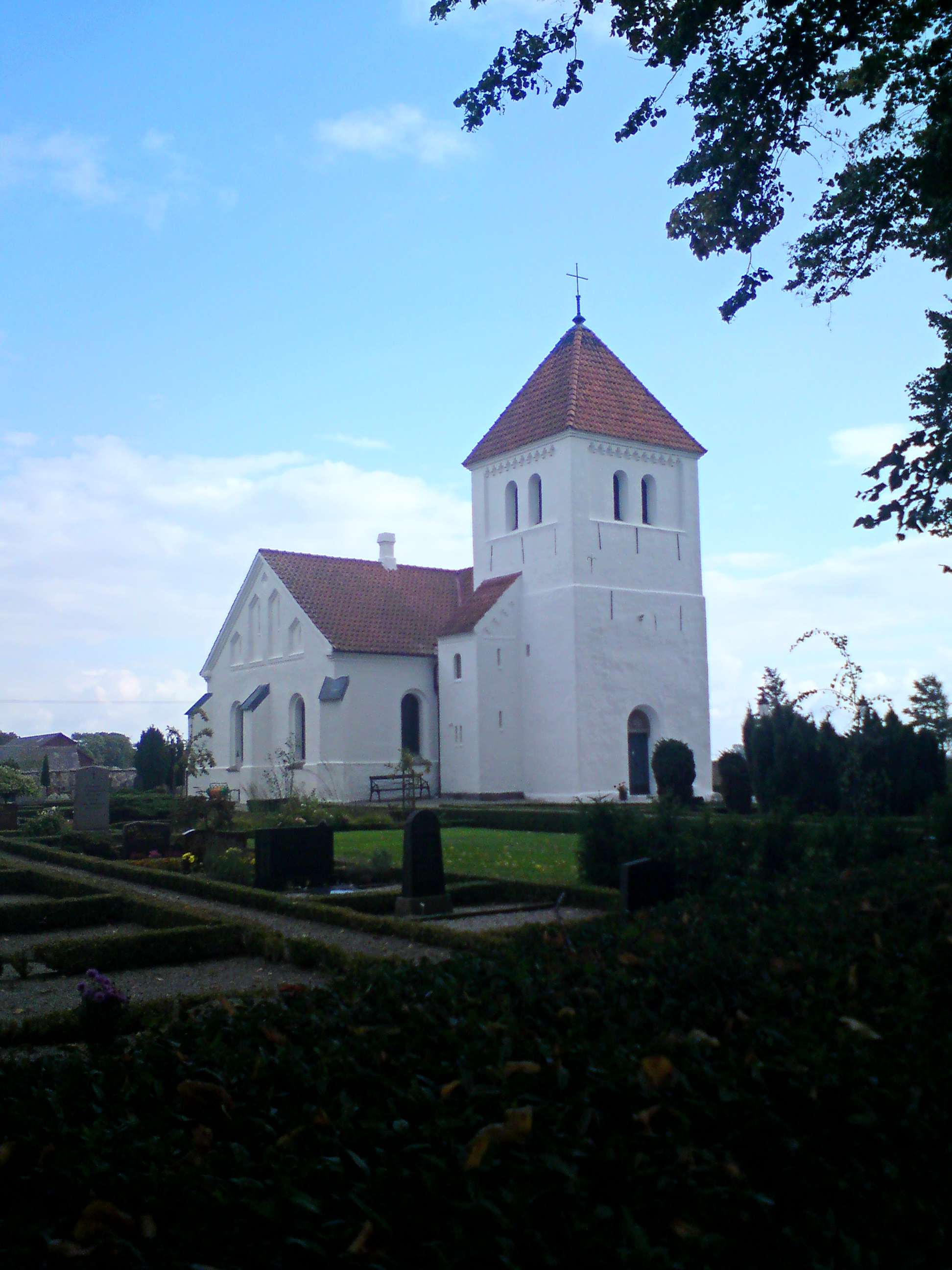 Hofterups kyrka